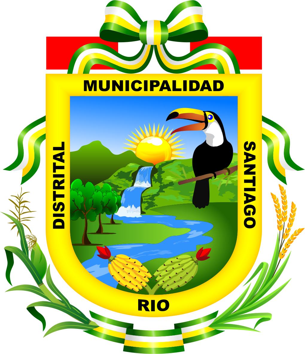 Distrito de Rio Santiago - Provincia de Condorcanqui - Región Amazonas